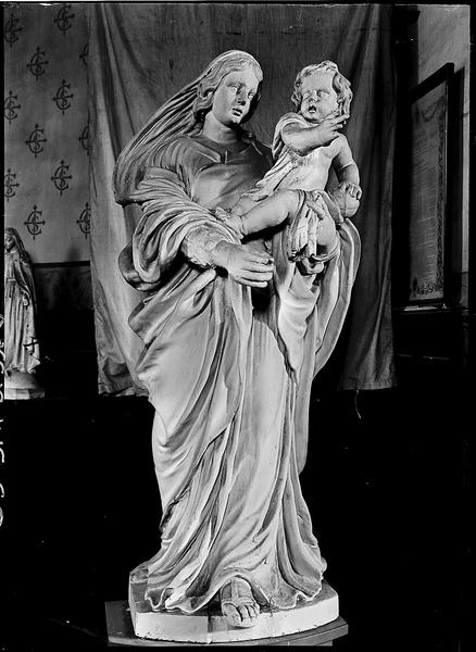 Skulptur Madonna mit Kind in der Kirche Saint-Médard in Andilly (Val-d’Oise)